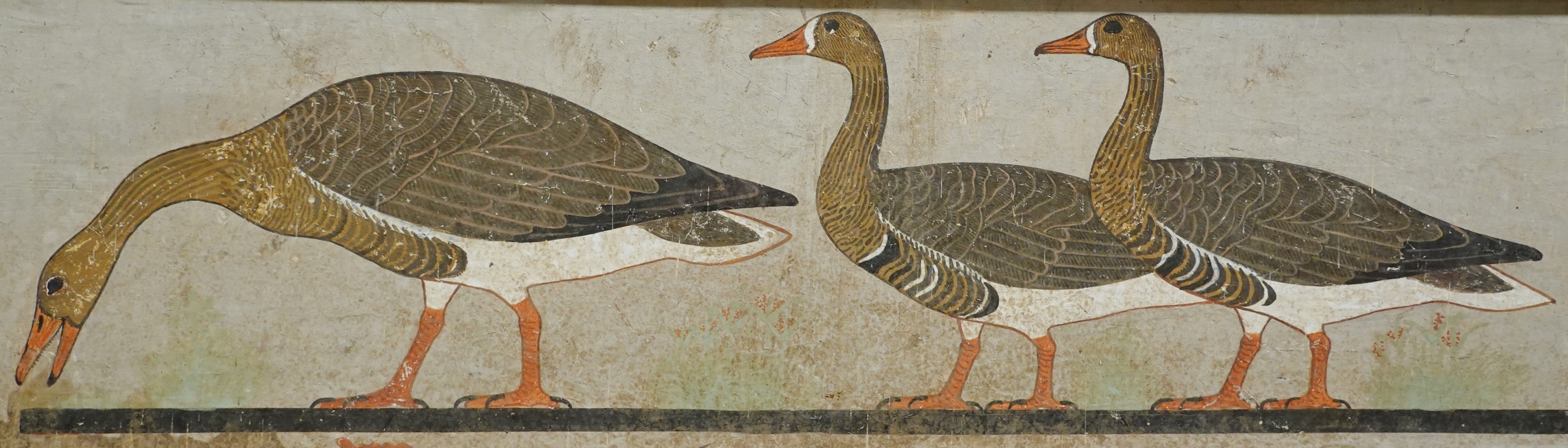 Ausschnitt (links) der „Gänse von Meidum“ aus dem Grab von Nefermaat und Atet in Meidum, 4. altägyptischen Dynastie, ausgestellt im Ägyptischen Museum in Kairo, Ägypten